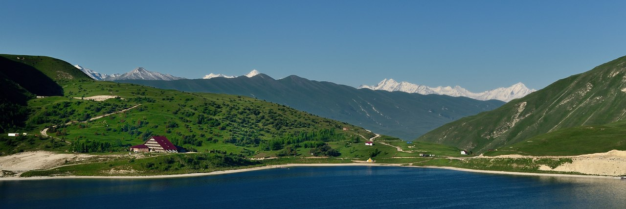 казиной-ам